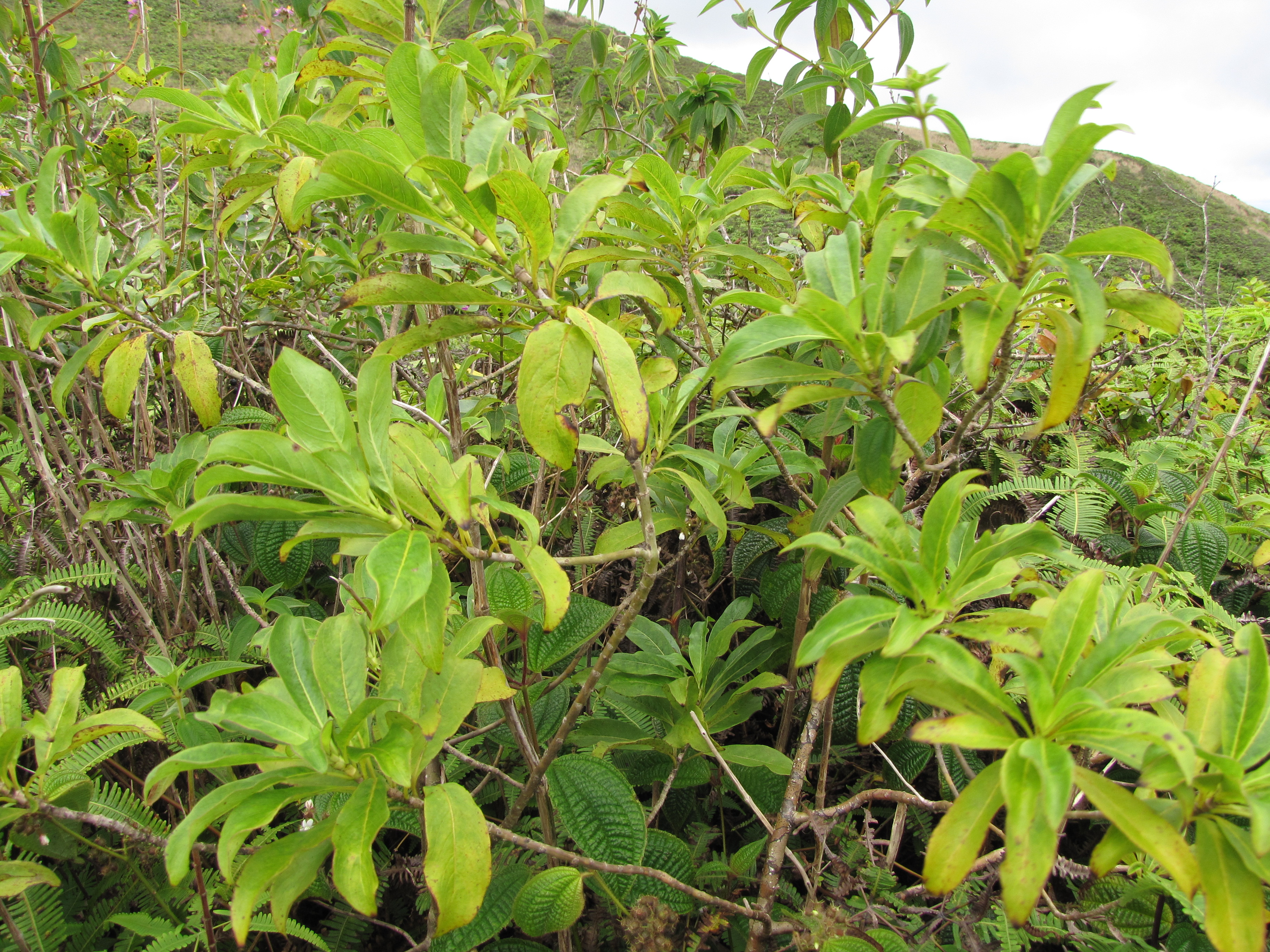 Coprosma pubens (Pilo) Habit at Makamakaole, Maui, Hawaii. September 24, 2011 #110924-9367 Image Use Policy